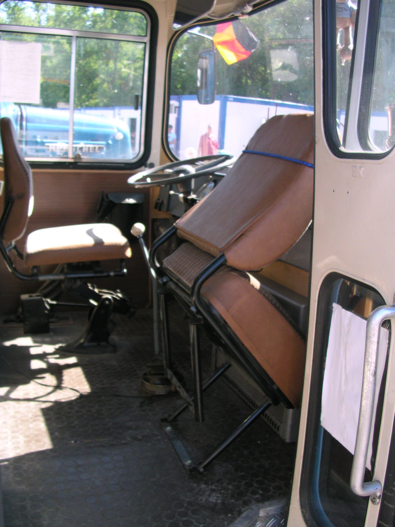 MAN HO M 11 von Zelte-Walter beim großen Oldtimertreffen im Mercedes-Werk in Wörth am Rhein 2006